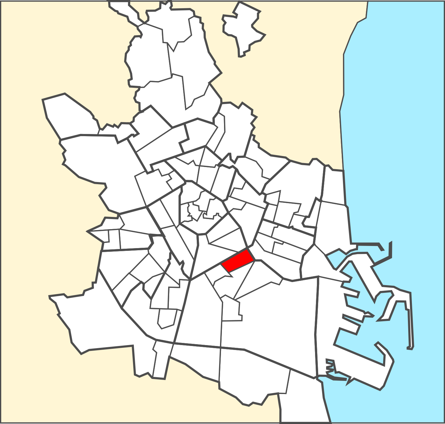 Localització del barri dins de la ciutat de València.